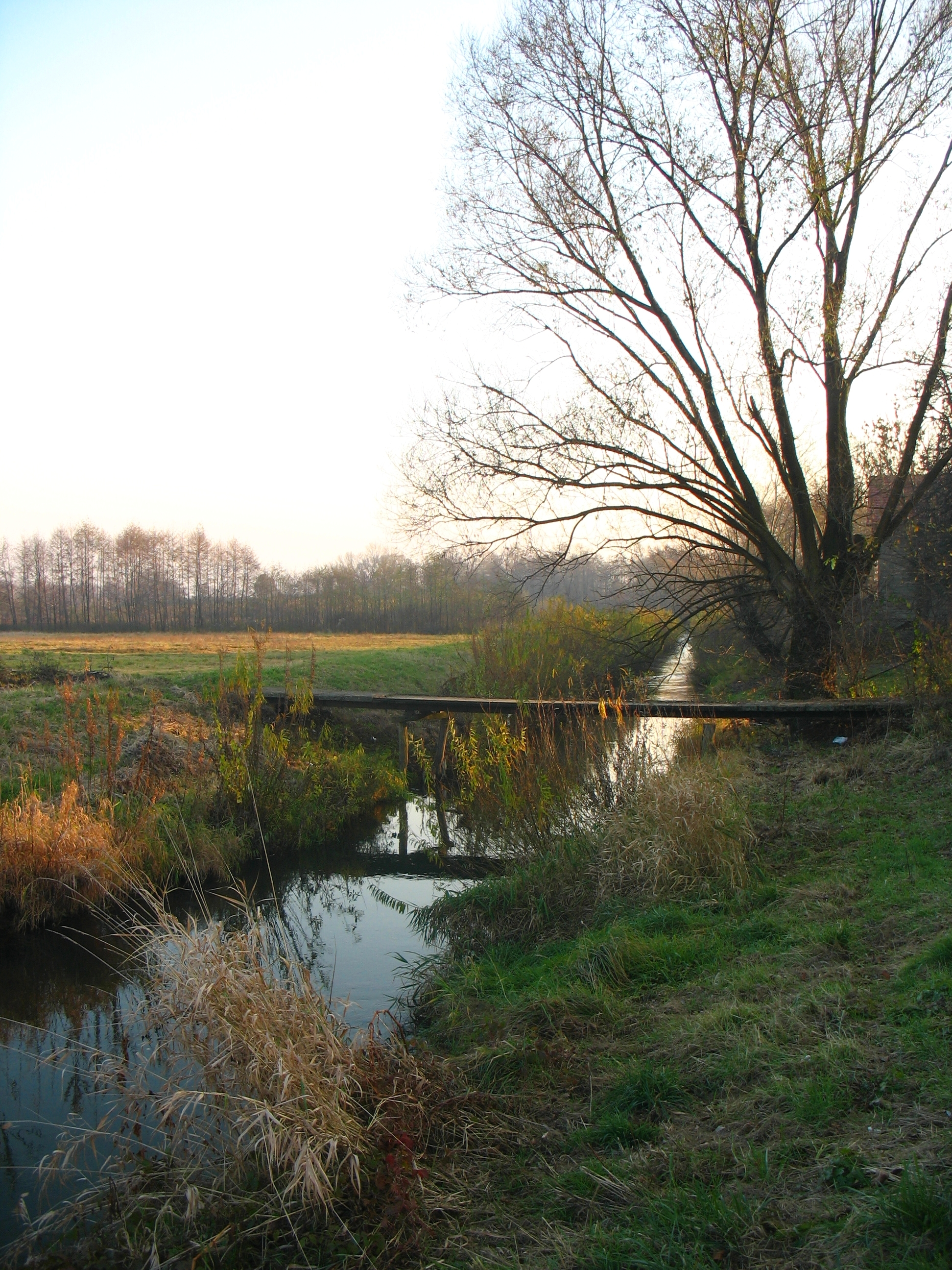 rzeka Macocha (Za Jazem)